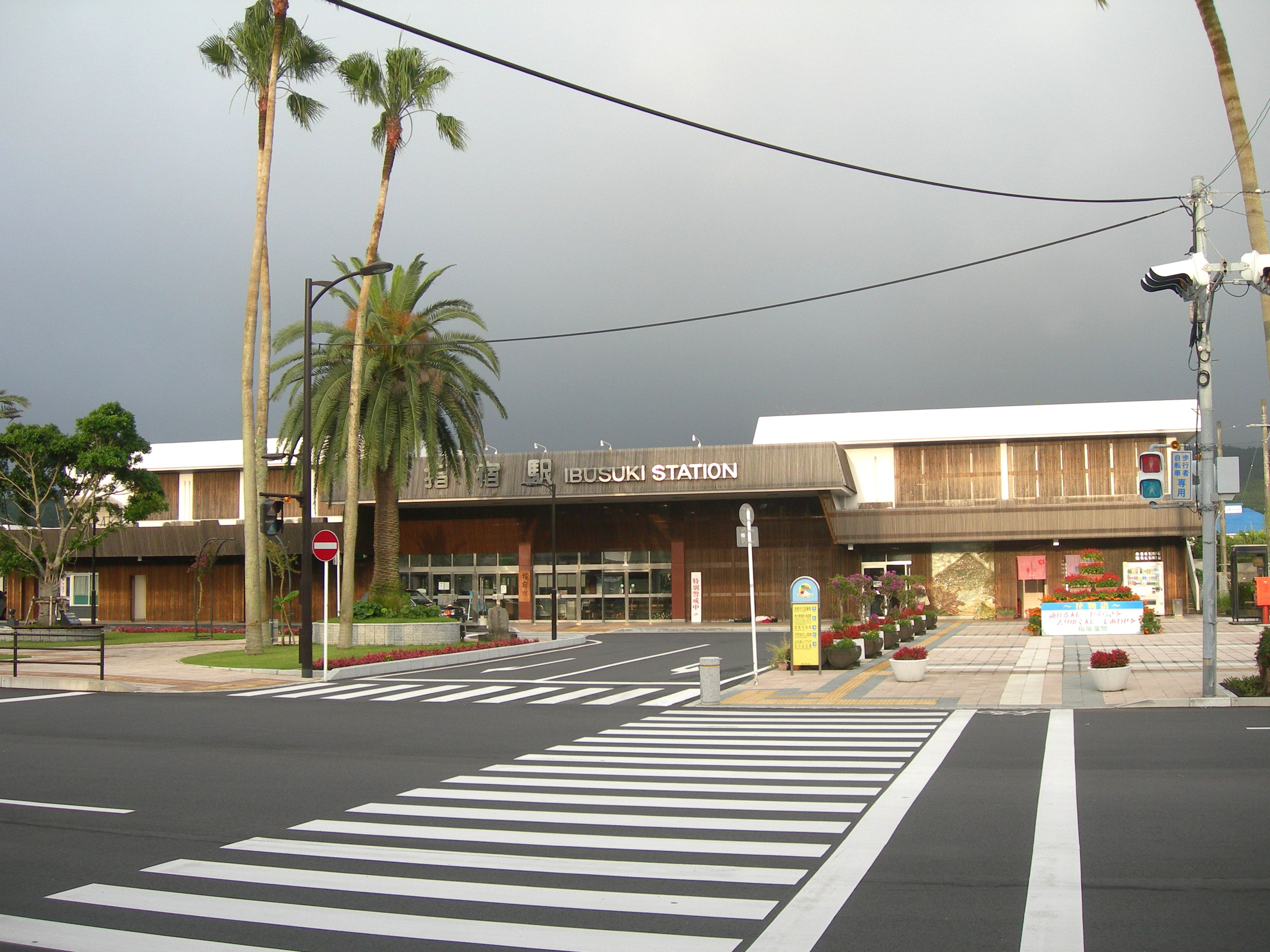 指宿駅